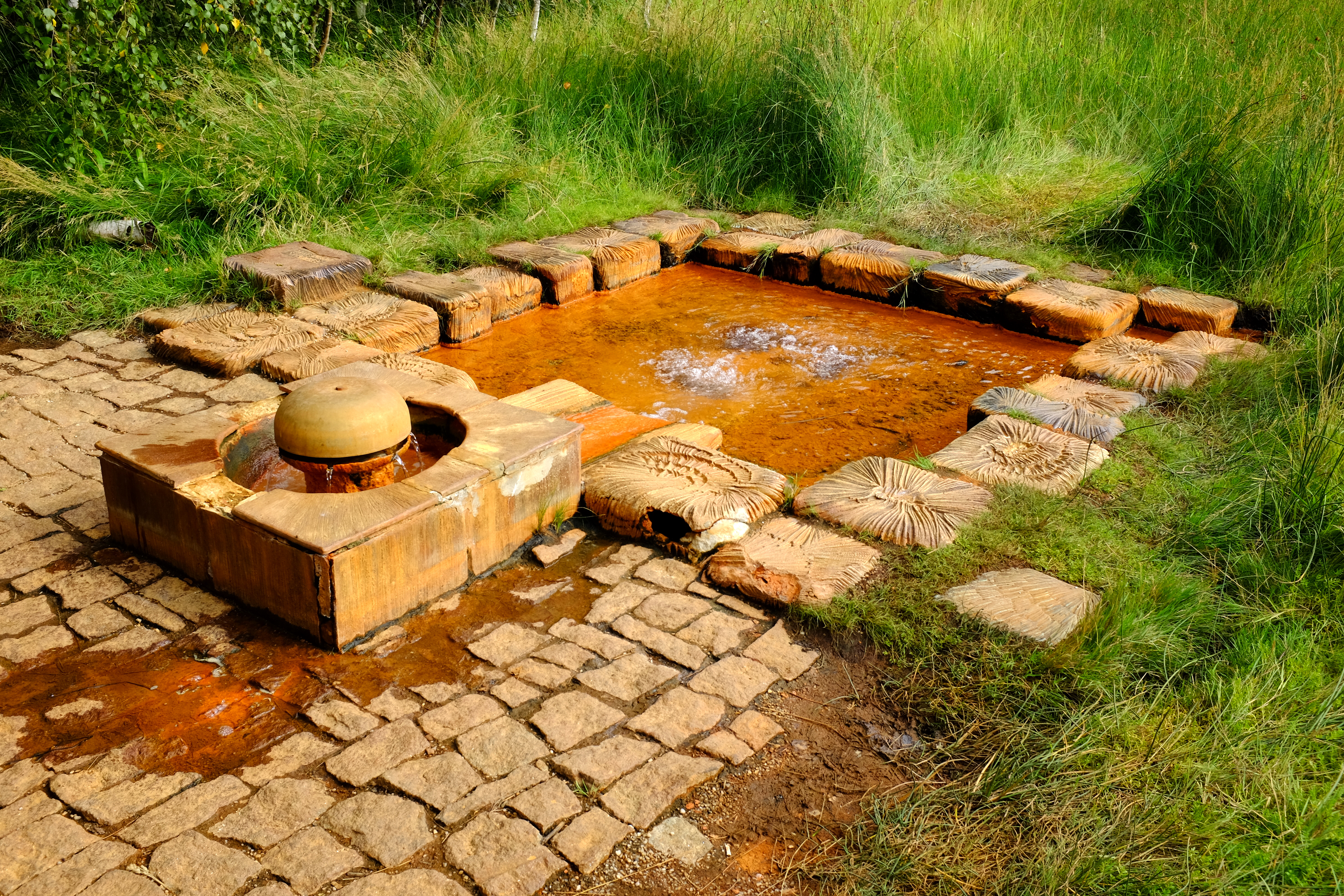 Přírodní rezervace Soos, Císařský pramen, okres Cheb